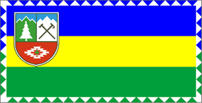 Прапор Косывського району